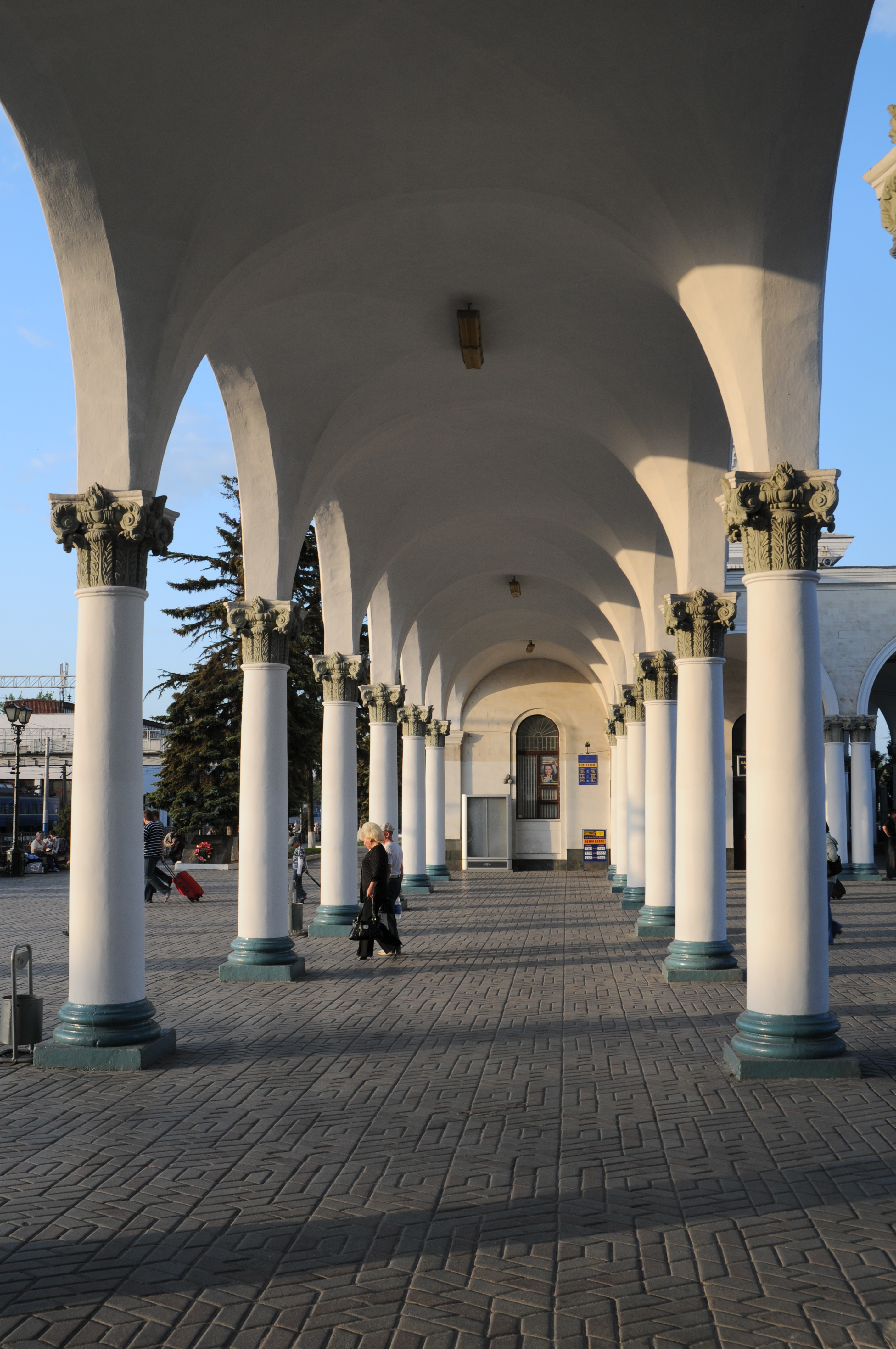 Сімферополь, залізничний вокзал